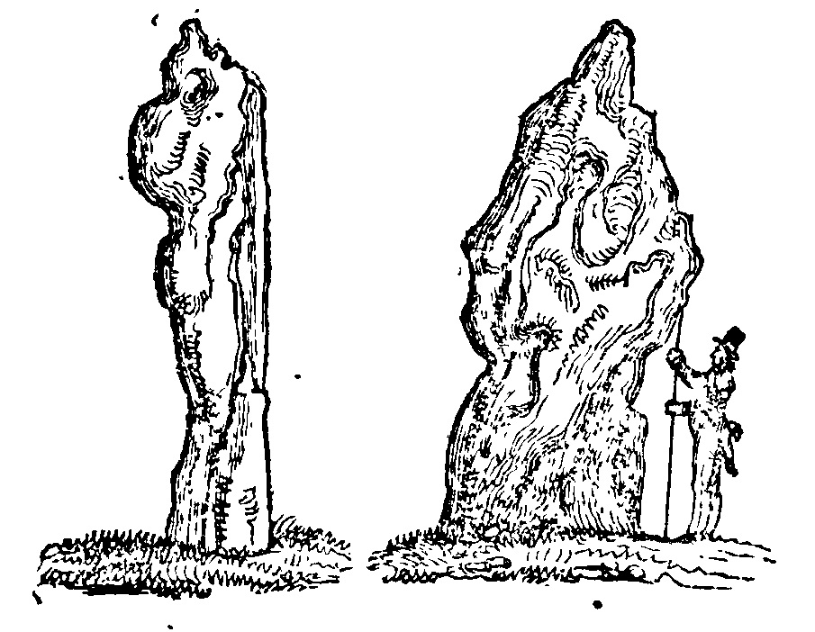 Dessin représentant le menhir de la Pierre de la Joure à Saint Ouen d'Attez. Extrait de l'article d'Auguste Le Prévost "Notice historique et archéologique sur le département de l’Eure" paru dans la Revue de la Société d’agriculture, sciences, arts et belles-lettres de l’Eure en 1832. Dessin de M. de Stabenrath